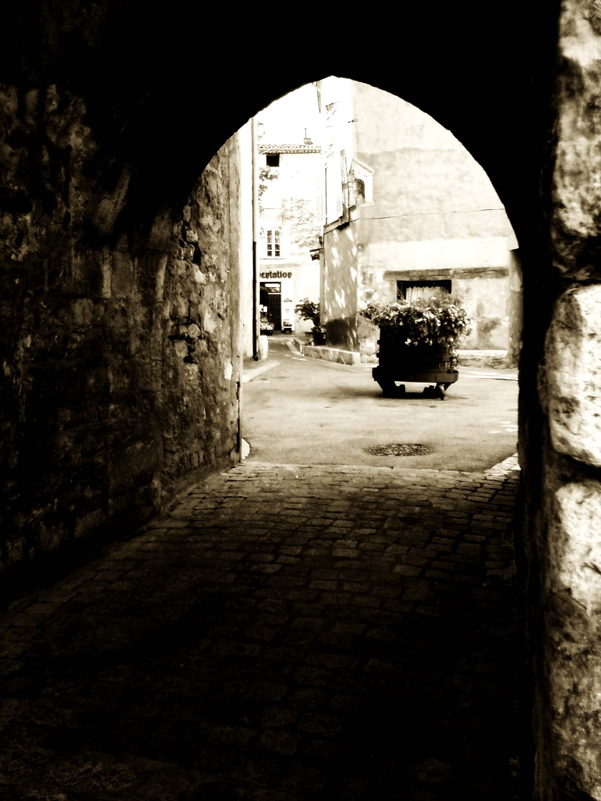 Cabasse, village du centre-var, près de Brignoles, recèle quelques petites perles lors de balades.